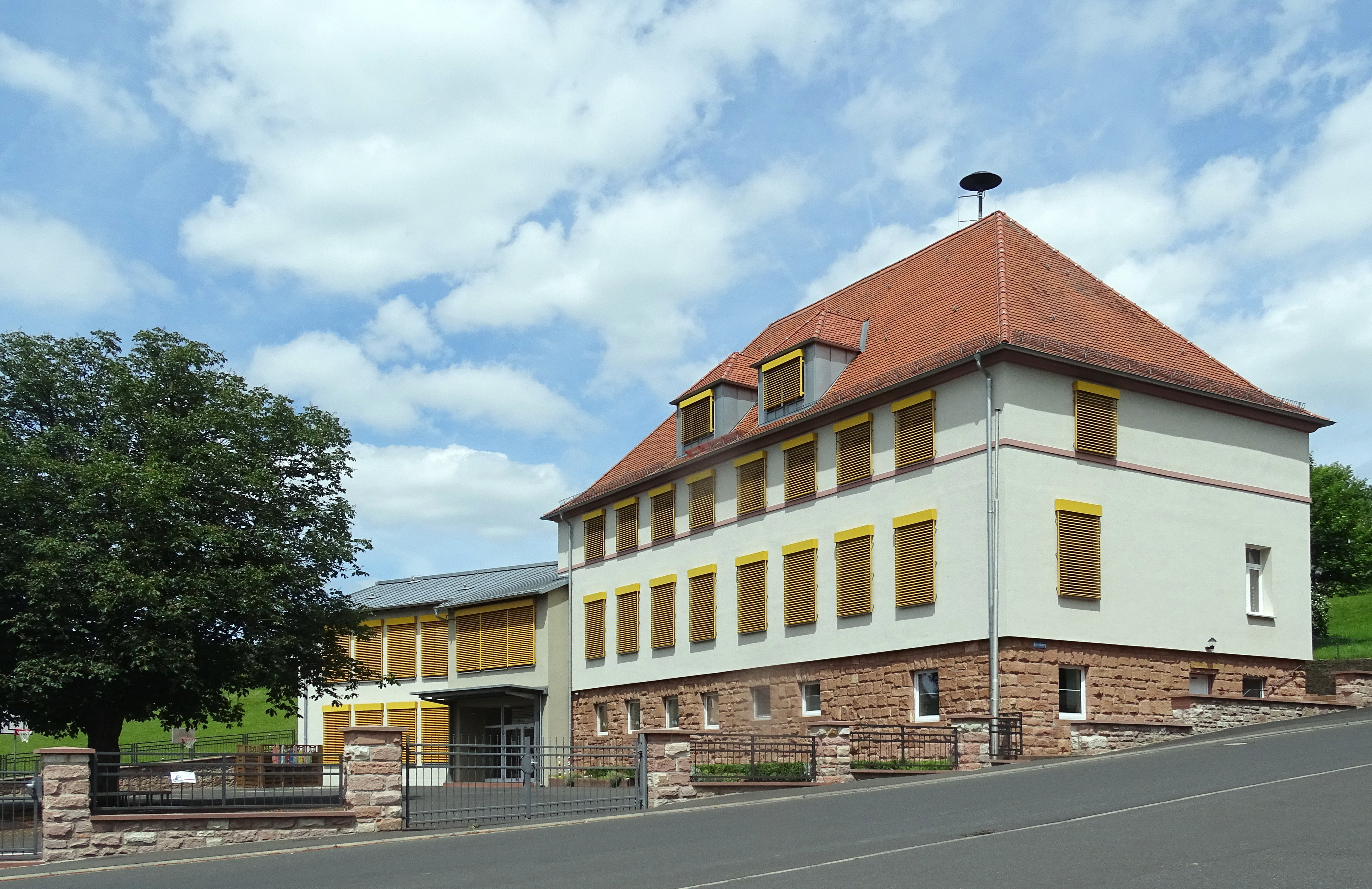 Schulhaus in Sommerkahl, Schulstraße 11